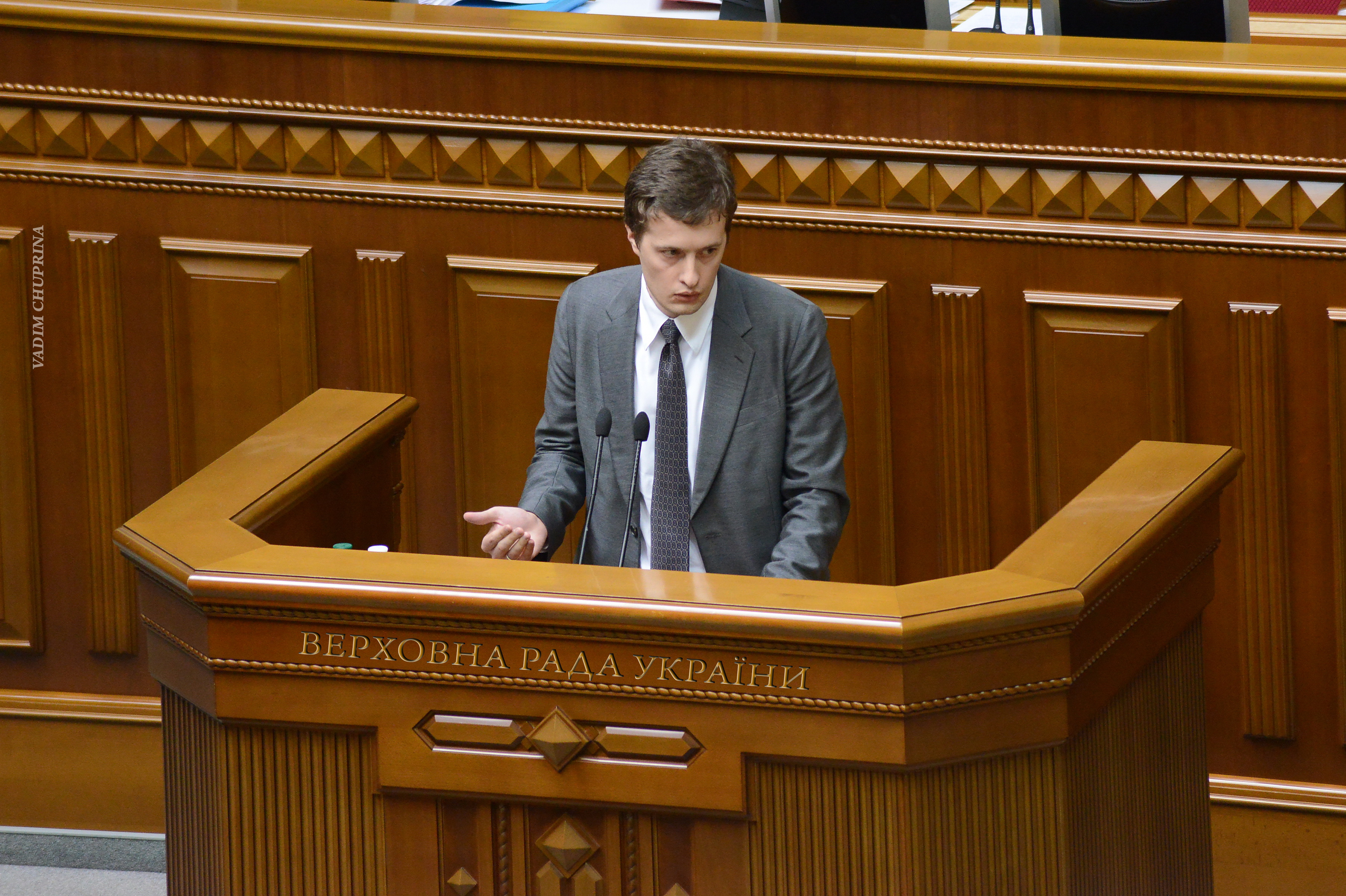 ВЕРХОВНА РАДА УКРАЇНИ 2015 , фото Вадим Чуприна